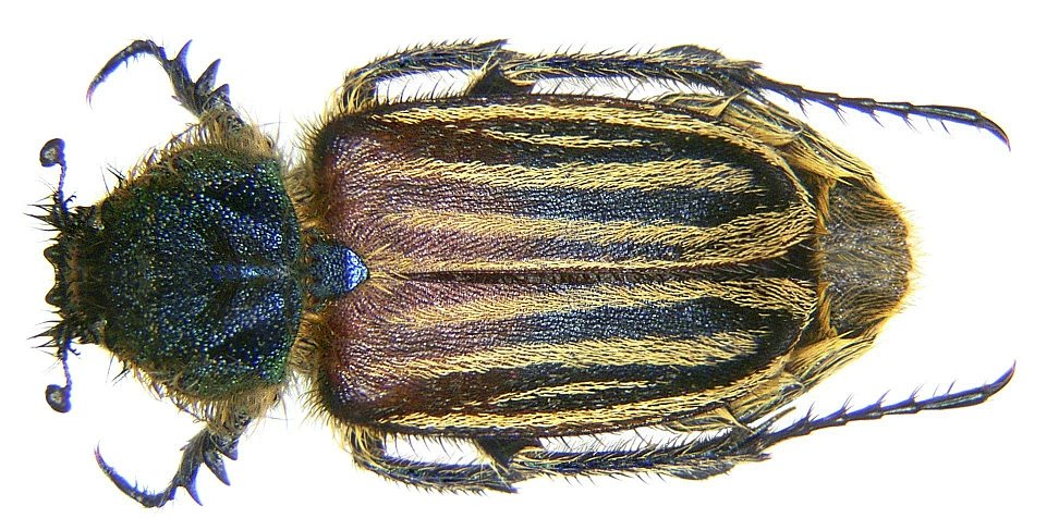 Eulasia vittata lineata (Faldermann, 1835) Familie: Glaphyridae Groesse: 16-22 mm Fundort: Türkei, Prov. Antalya, Gündogmus leg. A.Skale, 2006; det. Rößner Photo: U.Schmidt, 2006